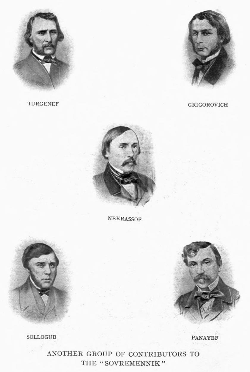 Sovremennik Contributors